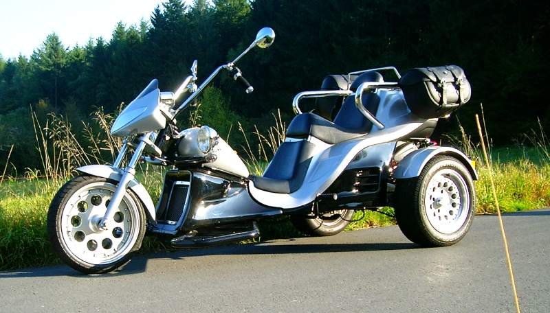 Boom Trike Fun500 auf einem Feldweg